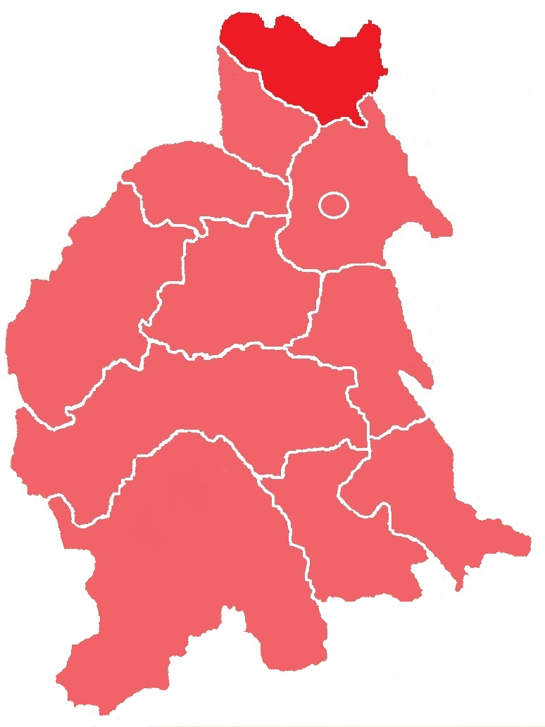 Заставнівський повіт